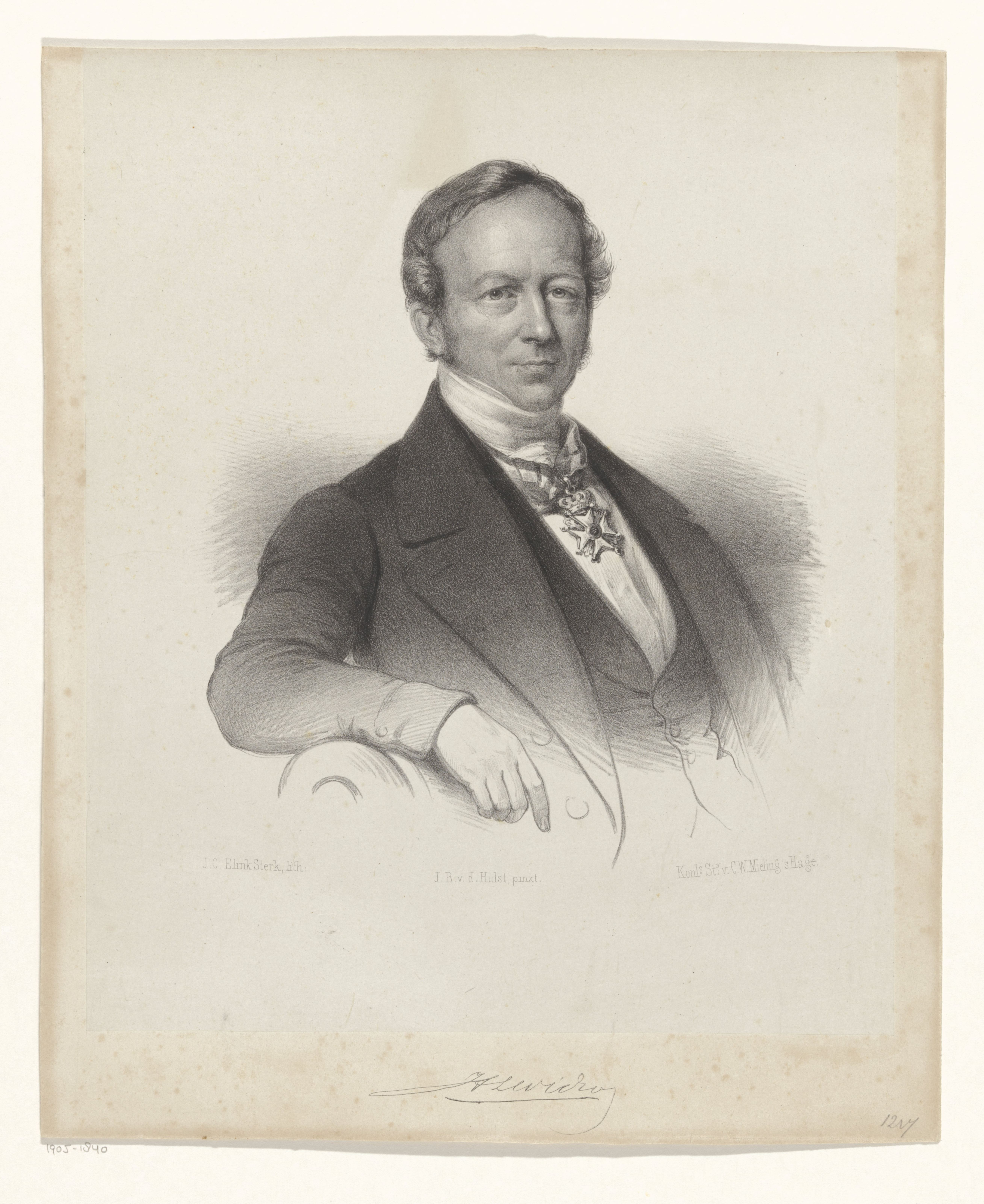 IdentificatieTitel(s): Portret van Hendrik Ludolf WichersObjecttype: prent Objectnummer: RP-P-1905-1840Opschriften / Merken: verzamelaarsmerk, verso, gestempeld: Lugt 2228Omschrijving: De geportretteerde zit in een stoel en steunt met zijn rechterarm op de leuning. Hij draagt een ridderorde om zijn hals. Onder het portret zijn signatuur.VervaardigingVervaardiger: prentmaker: Isaac Cornelis Elink Sterk (vermeld op object) naar ontwerp van: Jean-Baptiste Van der Hulst (vermeld op object) drukker: Koninklijke Nederlandse Steendrukkerij van C.W. Mieling (vermeld op object)Plaats vervaardiging: Den HaagDatering: 1818 - 1871Fysieke kenmerken: lithografie op chine colléMateriaal: papier chine collé Techniek: lithografie (techniek)Afmetingen: blad: h 357 mm × b 295 mmOnderwerpWat: historical persons (+ (full) bust portrait)knighthood orderWie: Hendrik Ludolf WichersVerwerving en rechtenVerwerving: aankoop 1905Copyright: Publiek domein